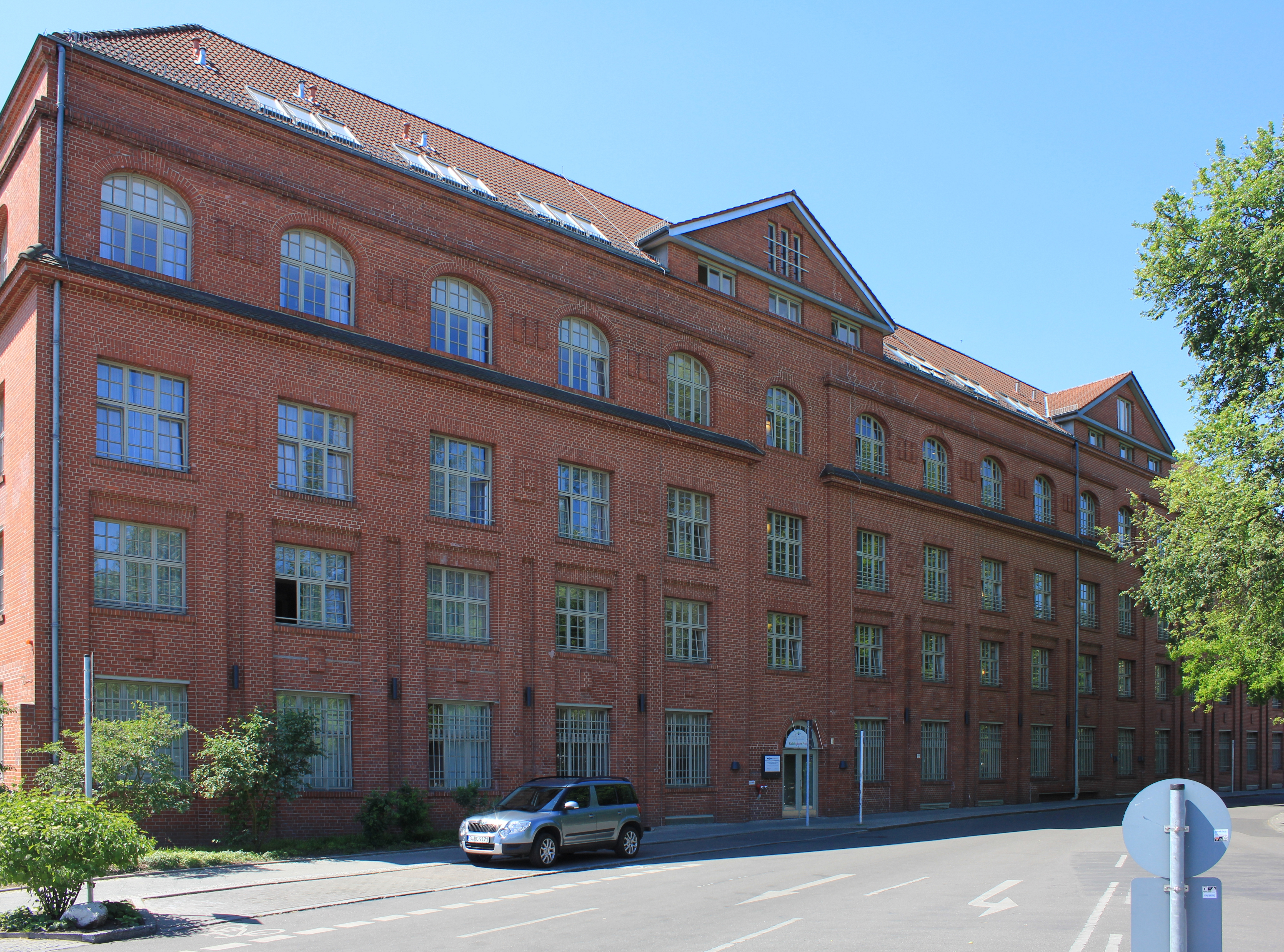 Humboldtmühle in Tegel - Mühlengebäude von 1913 (Architekten: H. Enders & Julius Lichtenstein)